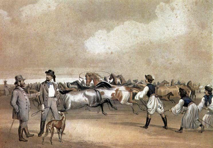 Lókifogás pányvával, 1855, Alföld